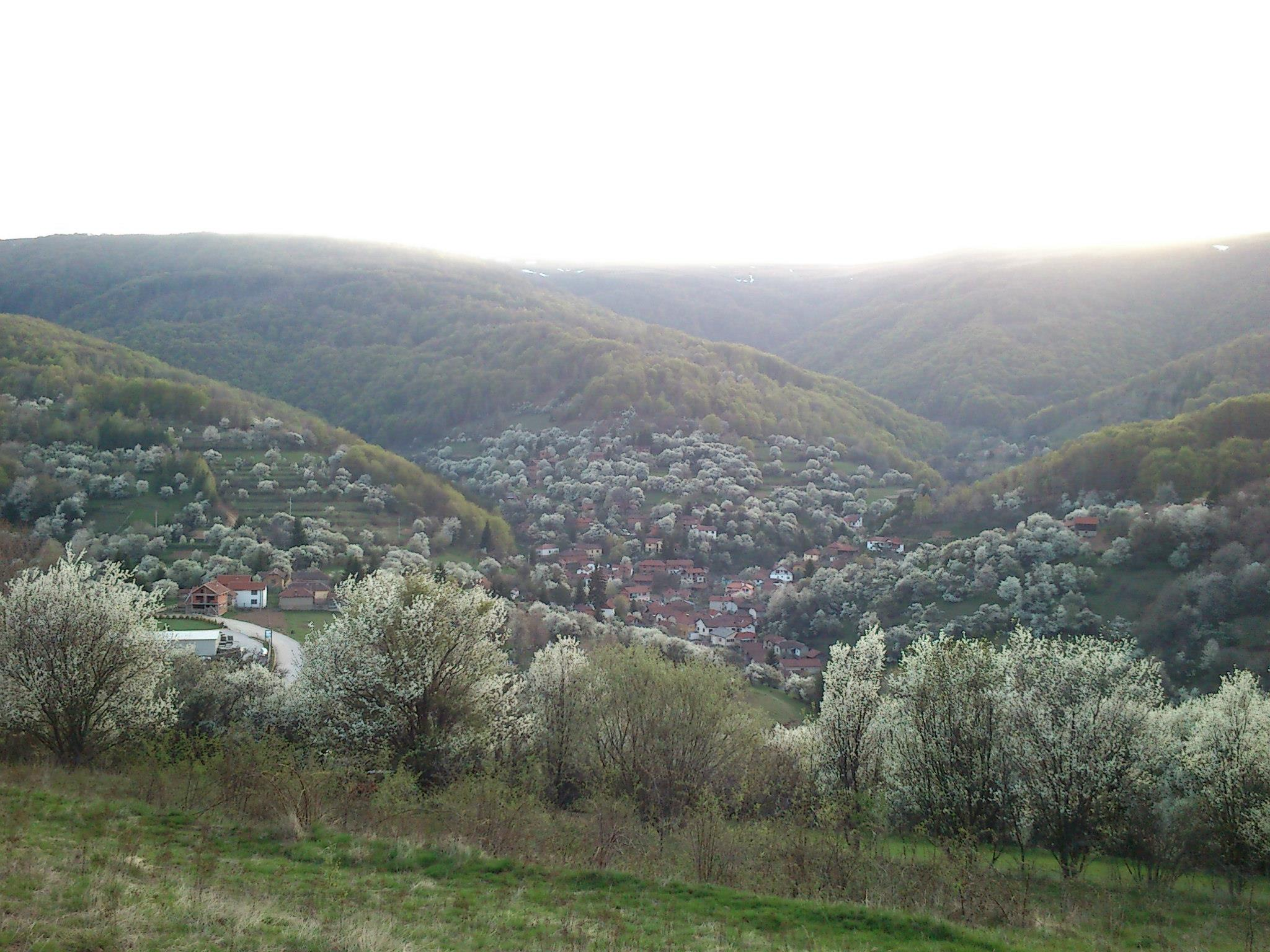 Template:Јв-предато